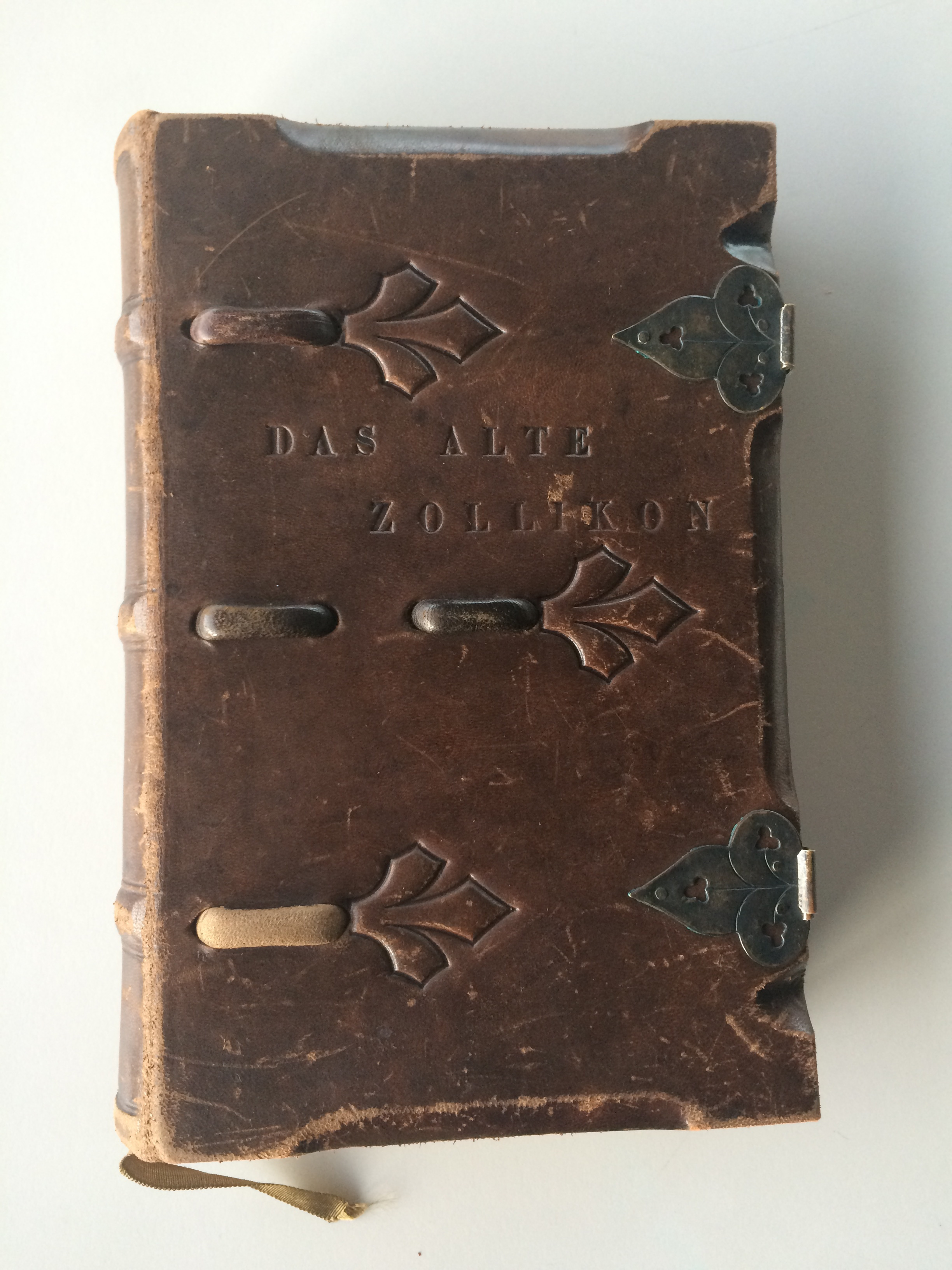 Heinrich Bruppacher, Alexander Nüesch: Das alte Zollikon.1899